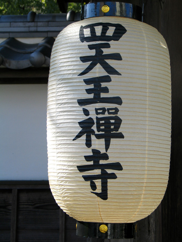 Shitennou zen-dera, Tsu-shi